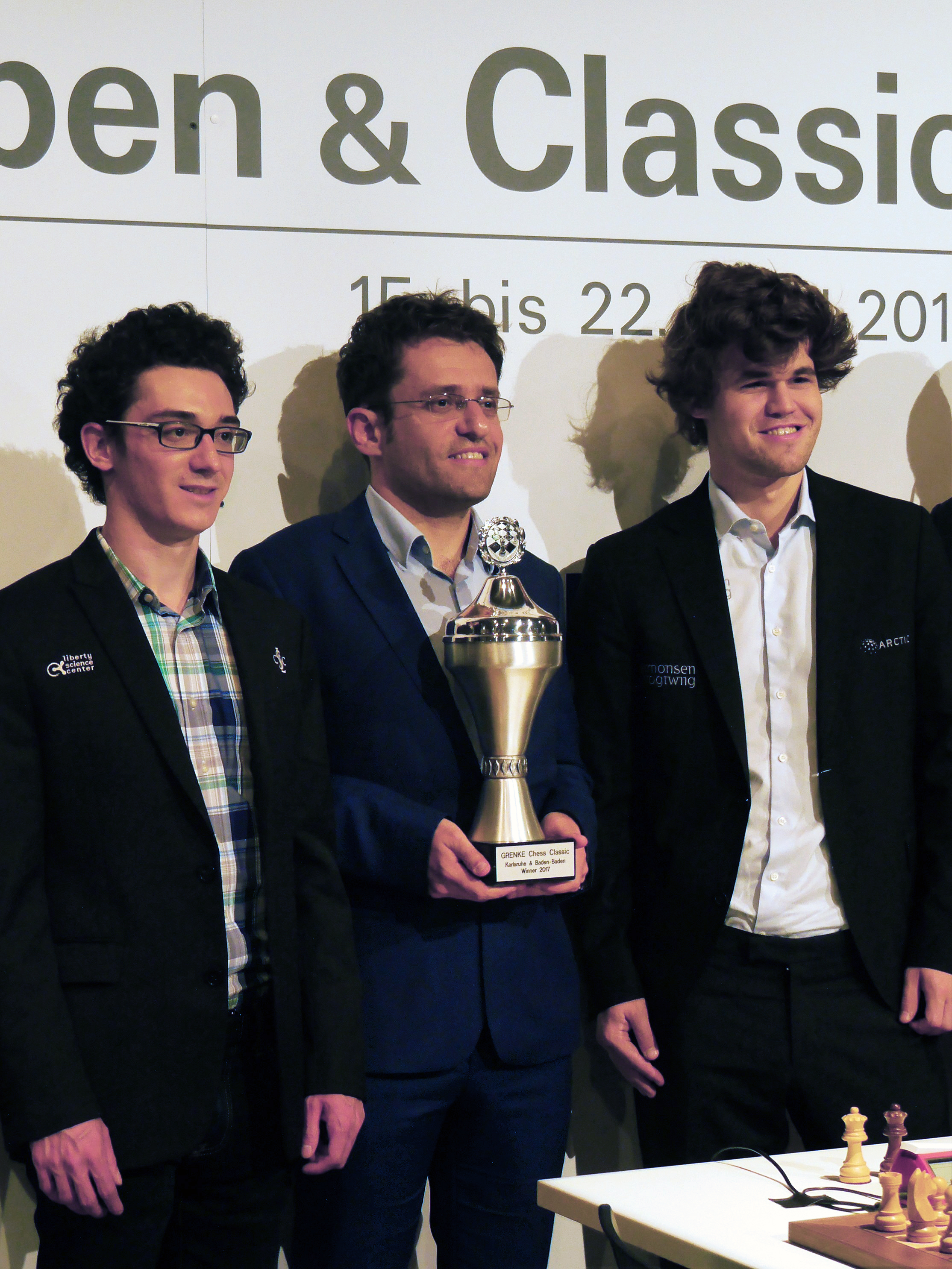 Die ersten Drei bei der Siegerehrung für die Grenke Chess Classic 2017 in Badeb-Baden. Von links nach rechts: Fabiano Caruana (2.), Levon Aronian (1.) und Magnus Carlsen (3.)